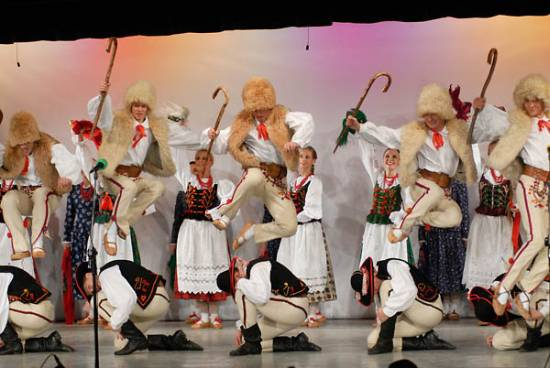 Inauguracja sezonu 2006 w Zespole Pieśni i Tańca Śląsk